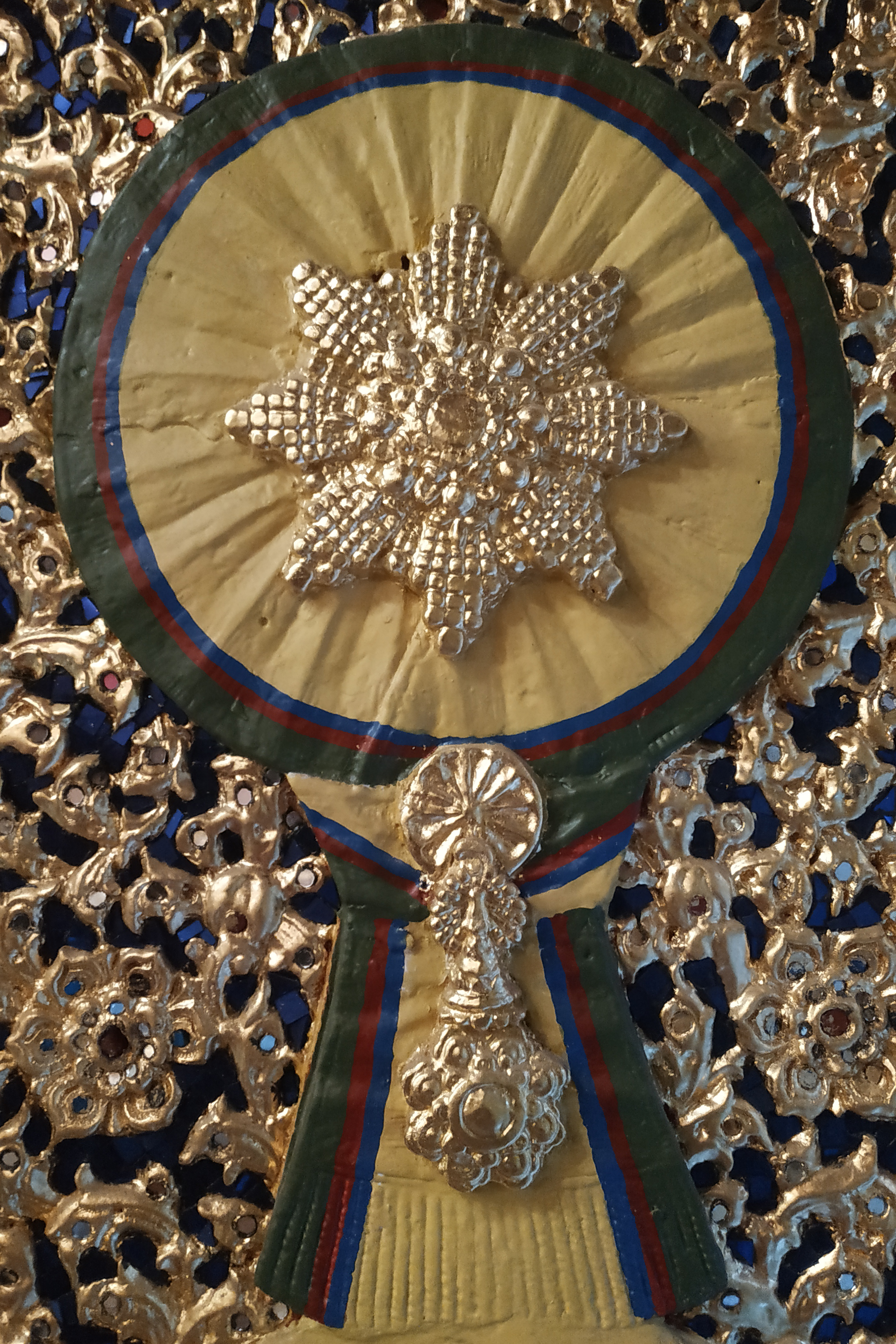 ลวดลายจำหลักไม้นูนสูงปิดทองระบายสี ภาพเครื่องราชอิสริยาภรณ์อันเป็นโบราณมงคลนพรัตนราชวราภรณ์ ณ บานหน้าต่างพระวิหาร วัดราชบพิธสถิตมหาสีมาราม กรุงเทพมหานคร บันทึกภาพเมื่อวันที่ 1 กุมภาพันธ์ พ.ศ. 2563